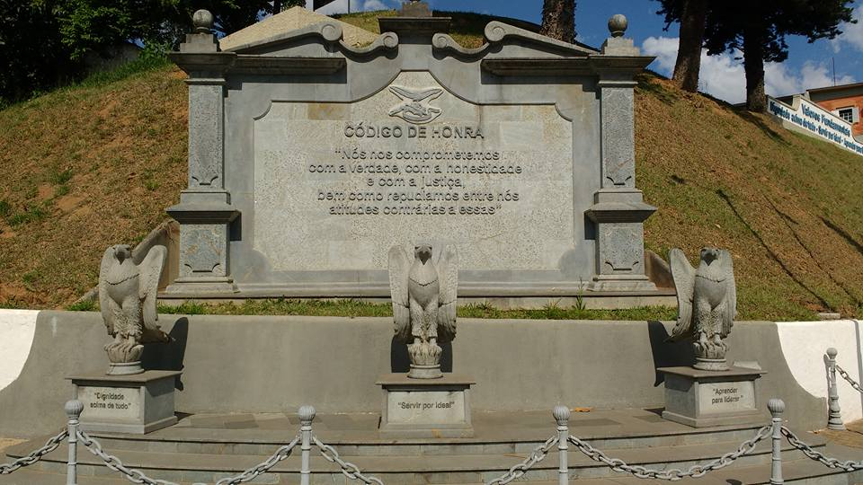 Compromisso firmada por todos os Alunos que cursam o CPCAR